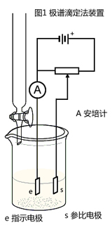 中文（中国大陆）: 安培滴定法图